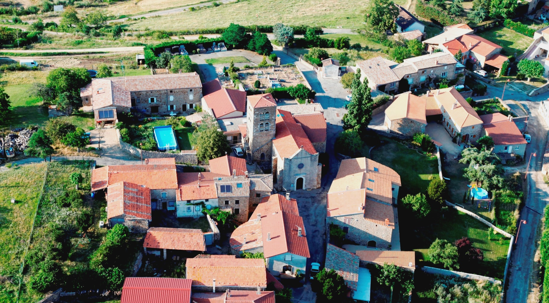 Saint-Jacques-d'Atticieux détail